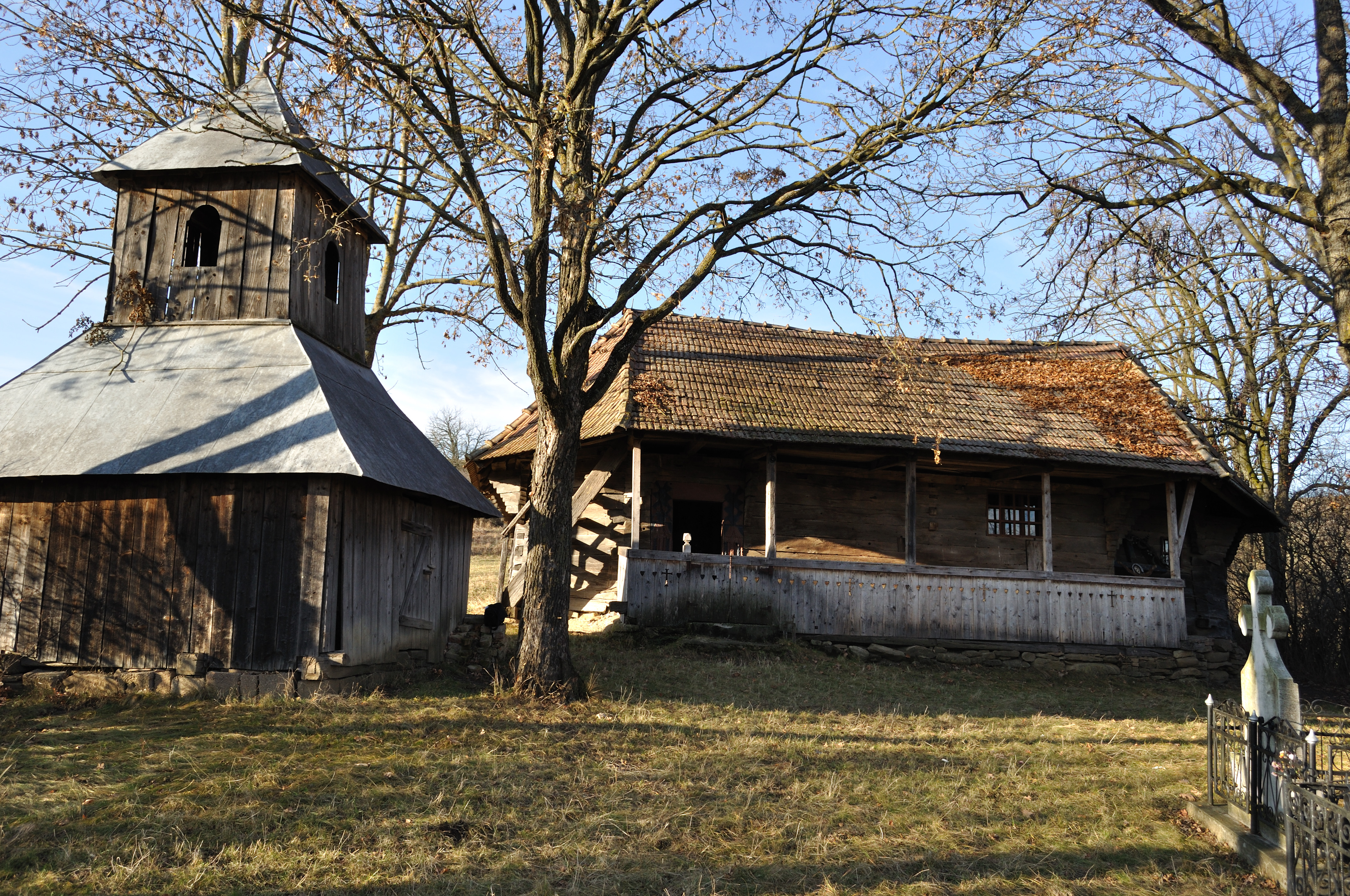 Biserica de lemn „Sfinții Arhangheli” din Fânațele Silivașului, județul Bistrița-Năsăud